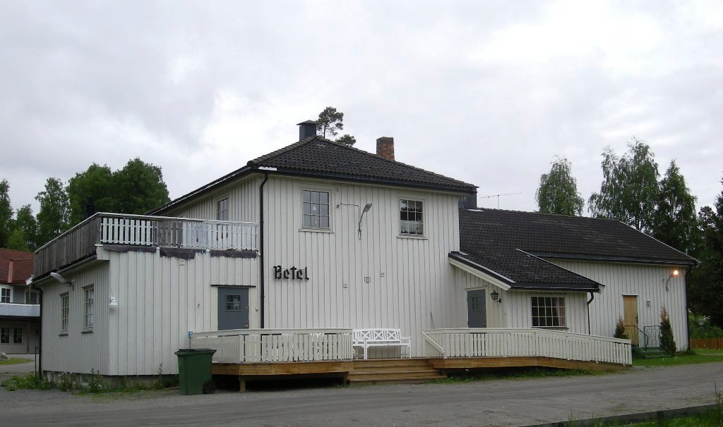 Pinsekirken Betel på Dal i Eidsvoll kommune